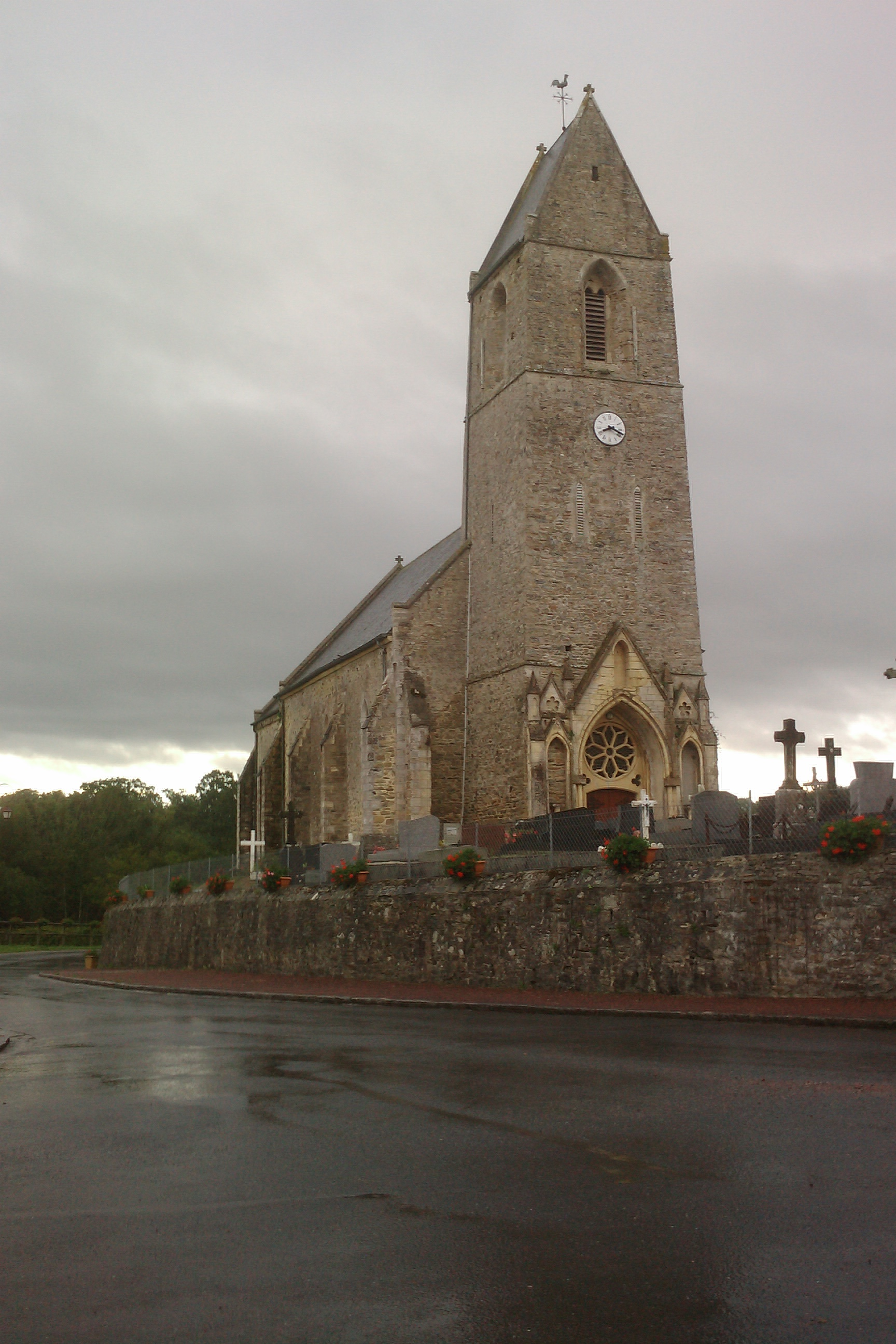 Église de Lozon